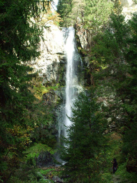 Cascata di Vandoies, Alto Adige, Italia